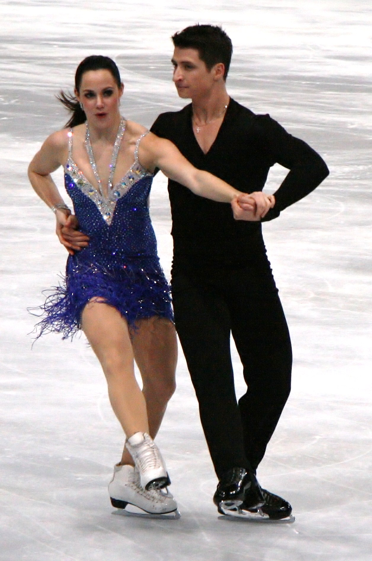 Тесса Виртью и Скотт Моир на 2011 Trophée Eric Bompard